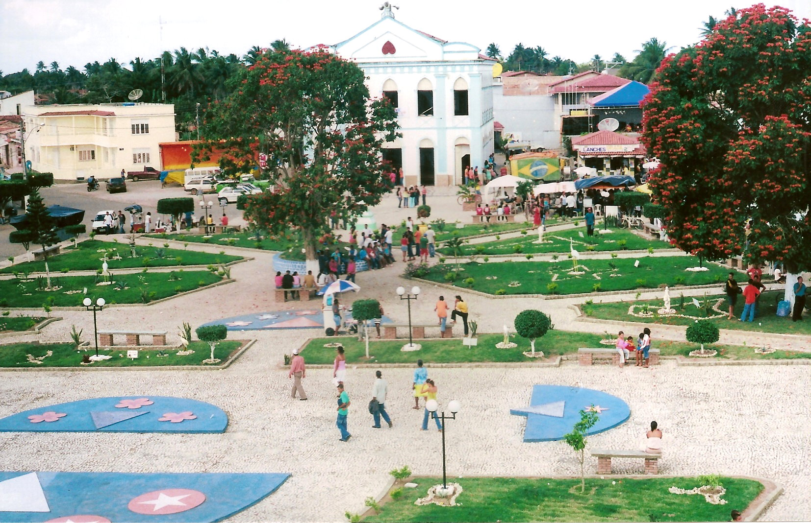 praça de Aporá 2007